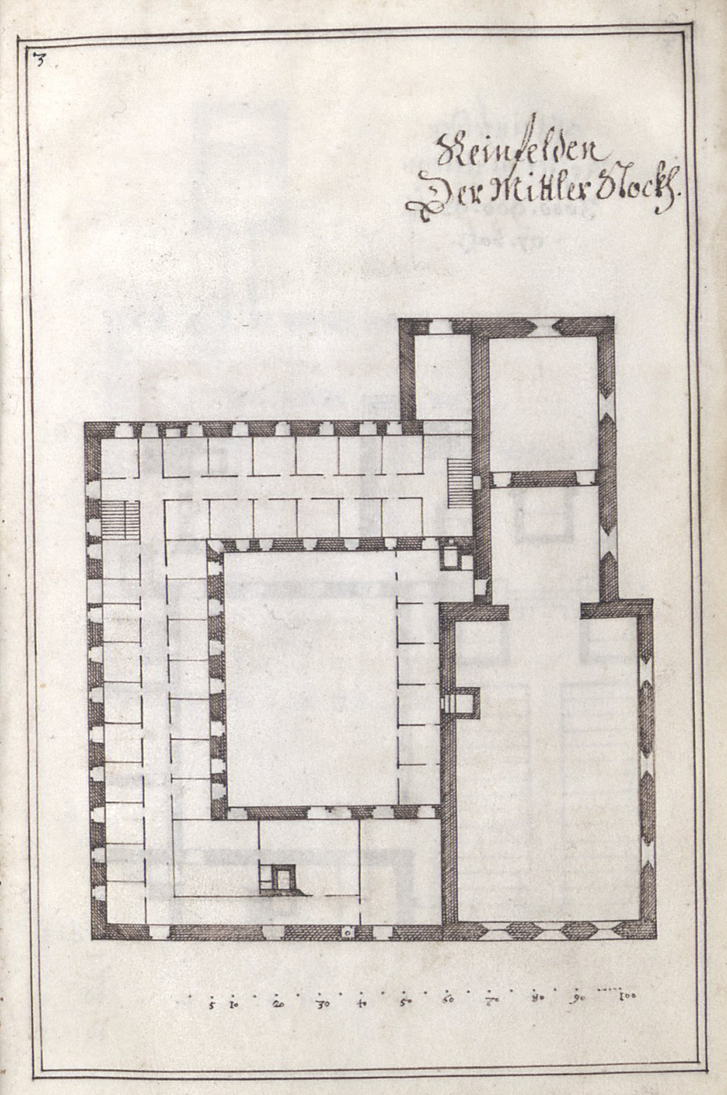 Architectura Capucinorum, Handschrift, 17. Jh., Württembergische Landesbibliothek, Cod. Don. 879, fol. 3r, Rheinfelden/Aargau